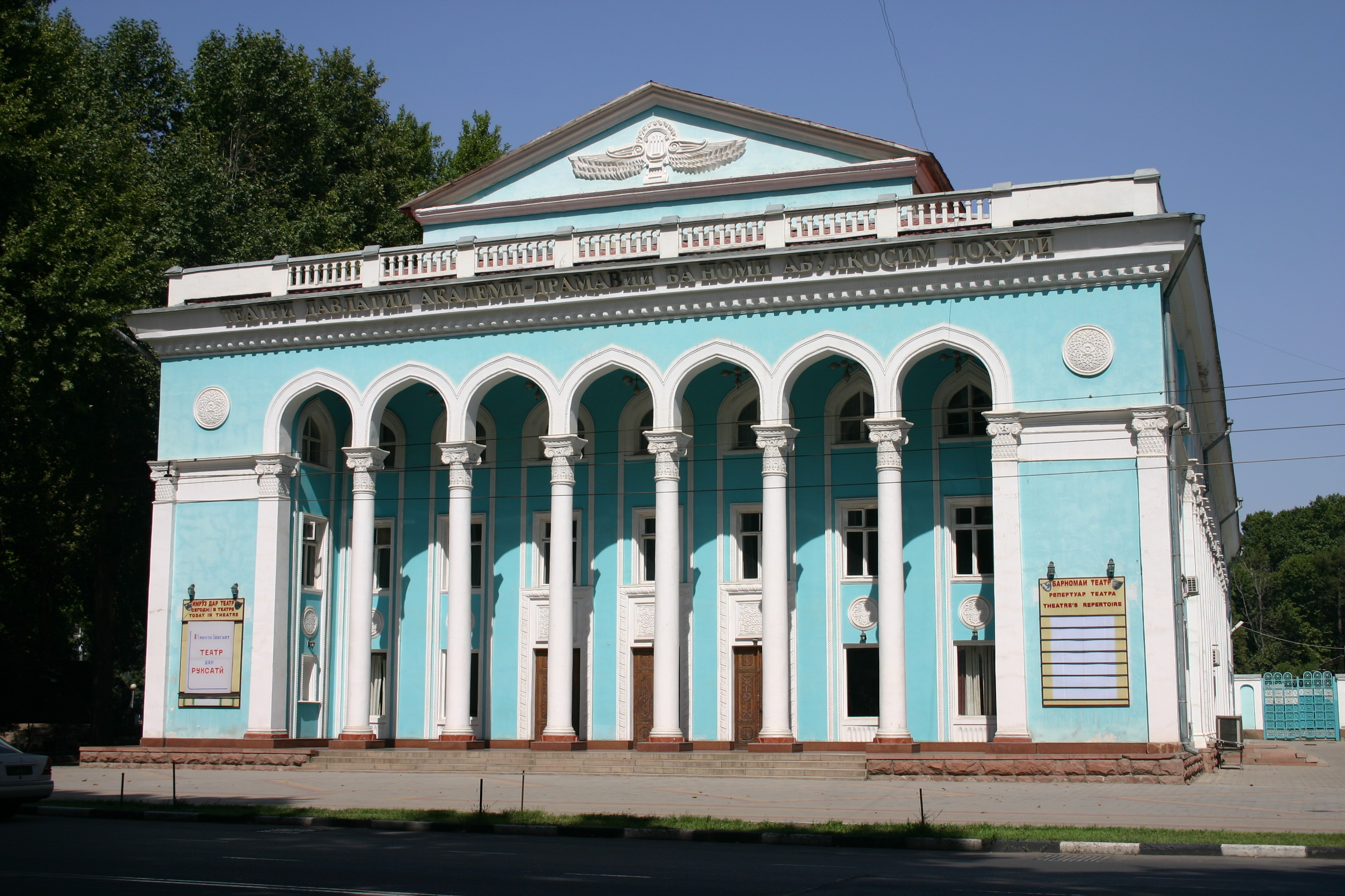 Театр имени Лахути в Душанбе.